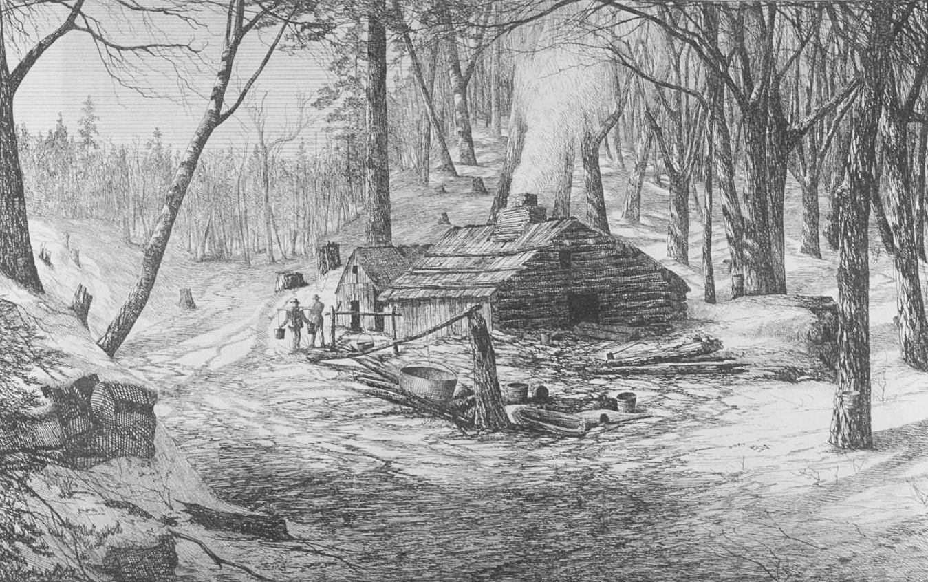 « Une érablière » par Allan Edson, gravure tirée de L'opinion publique, Vol. 3, no. 20, pp. 234 (16 mai 1872)